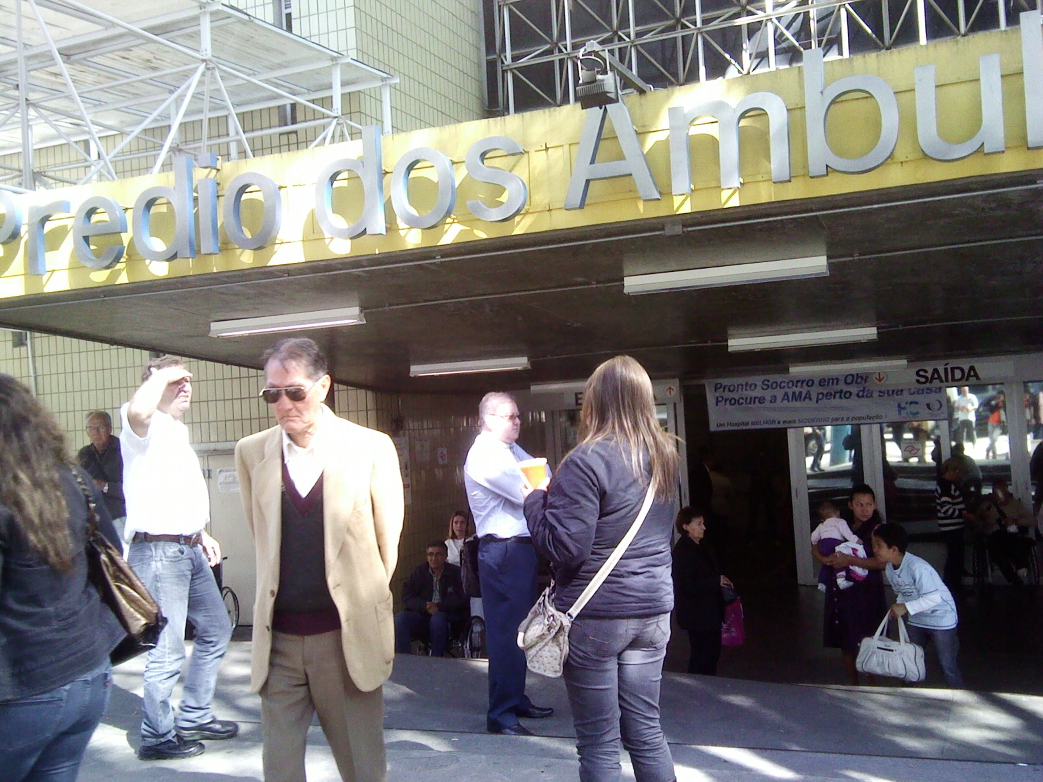 Fachada do Prédio dos Ambulatórios da FMUSP